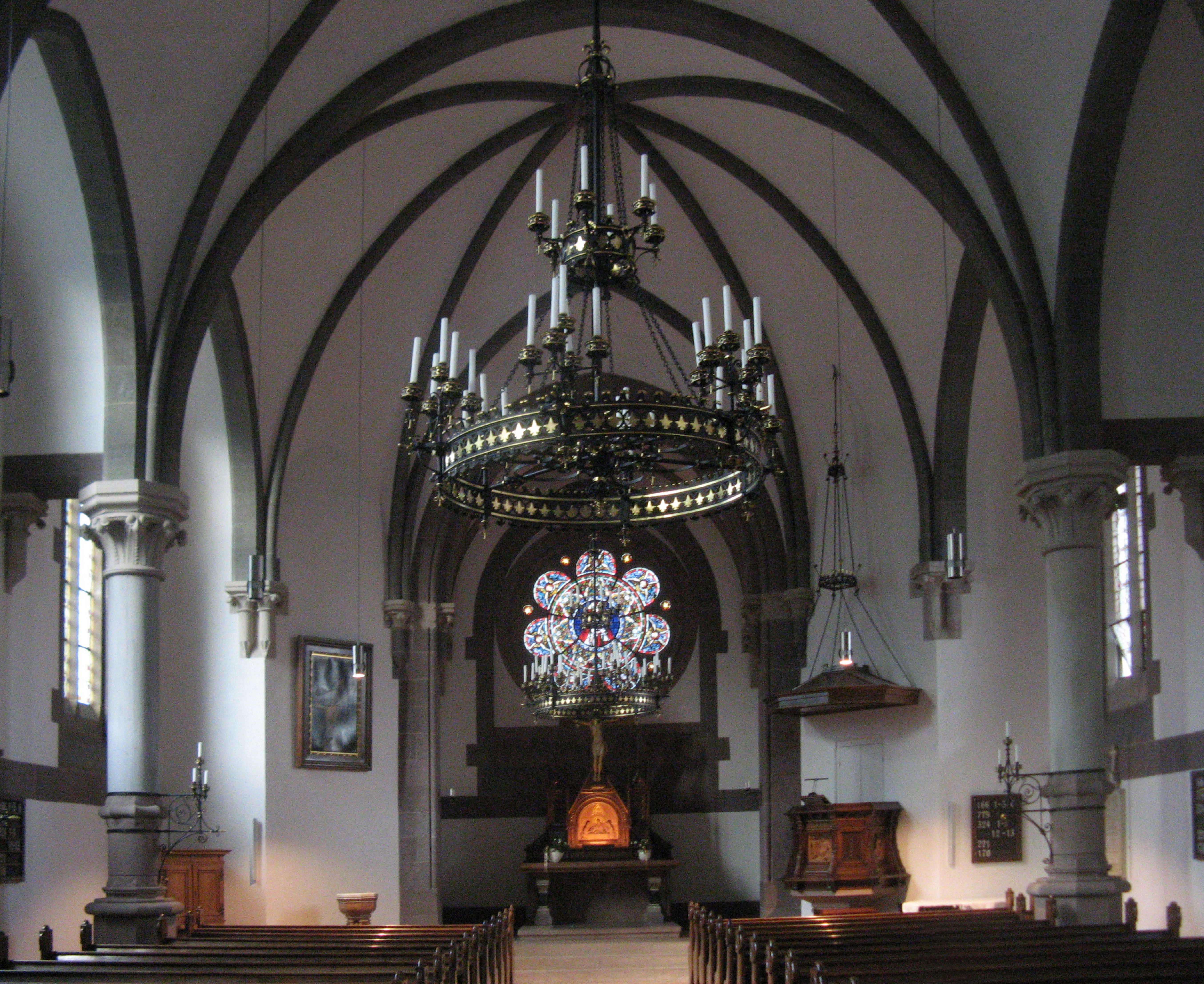 Christuskirche, Innenraum, Meran